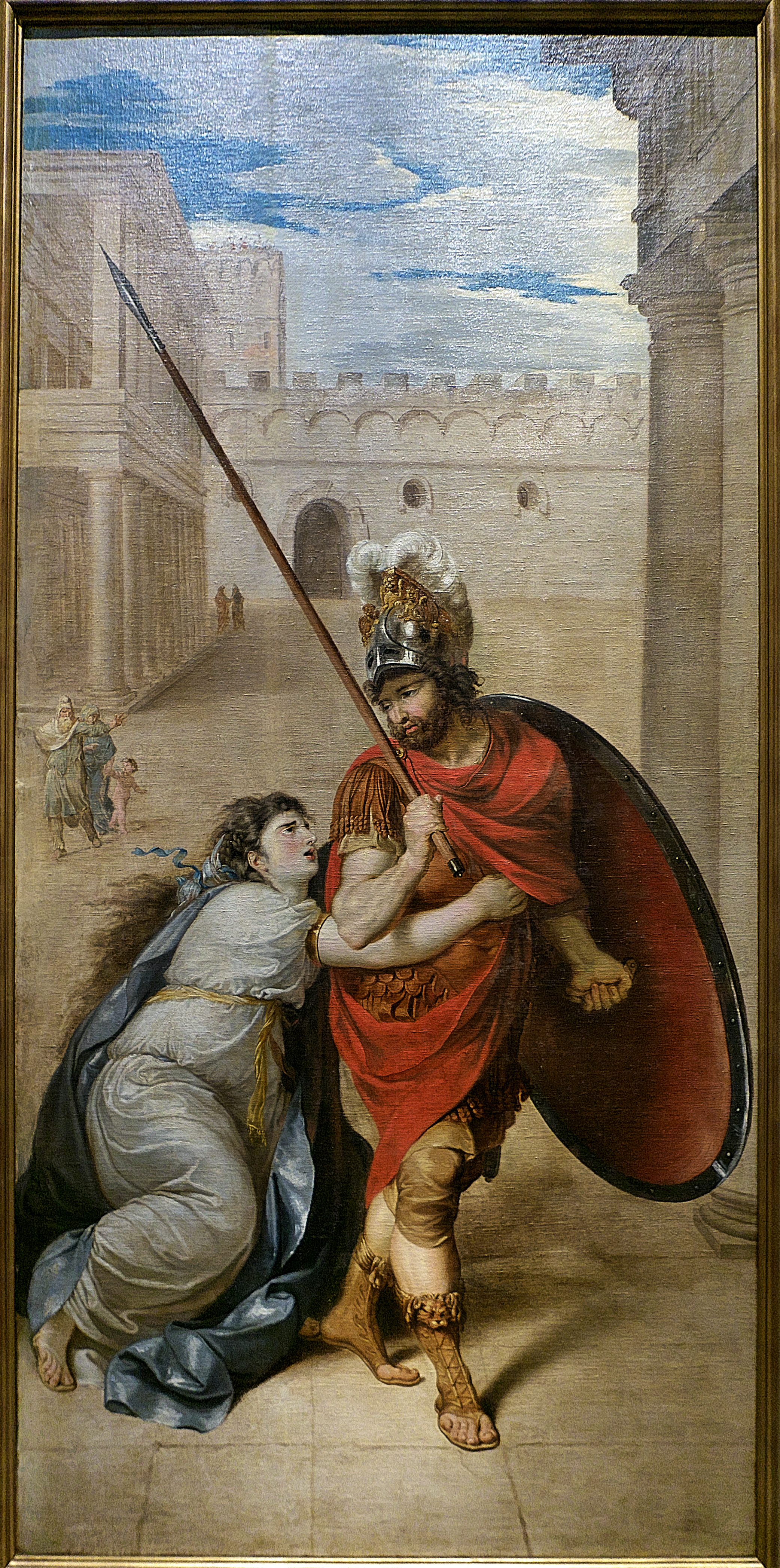 Héctor marcha para combatir contra Aquiles, y su esposa Andrómaca intenta impedirlo. Julien de Parma, último cuarto del siglo XVIII, óleo sobre lienzo.